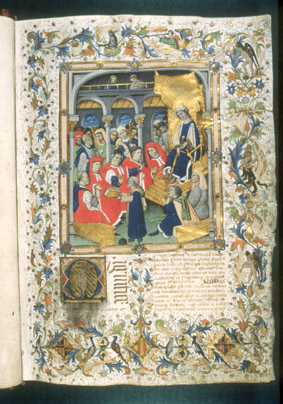 Commentaria super Usaticis Barchinonensis